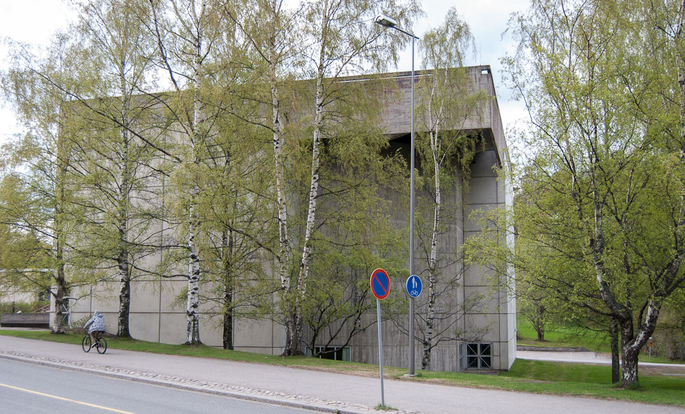 Alavan kirkko Kuopiossa itäpuolelta